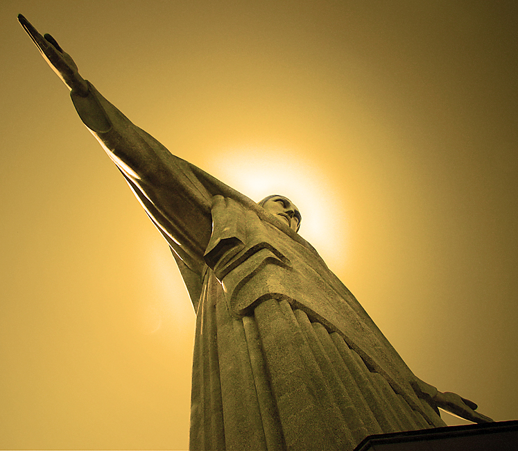 Christus Erlöser in Rio de Janeiro